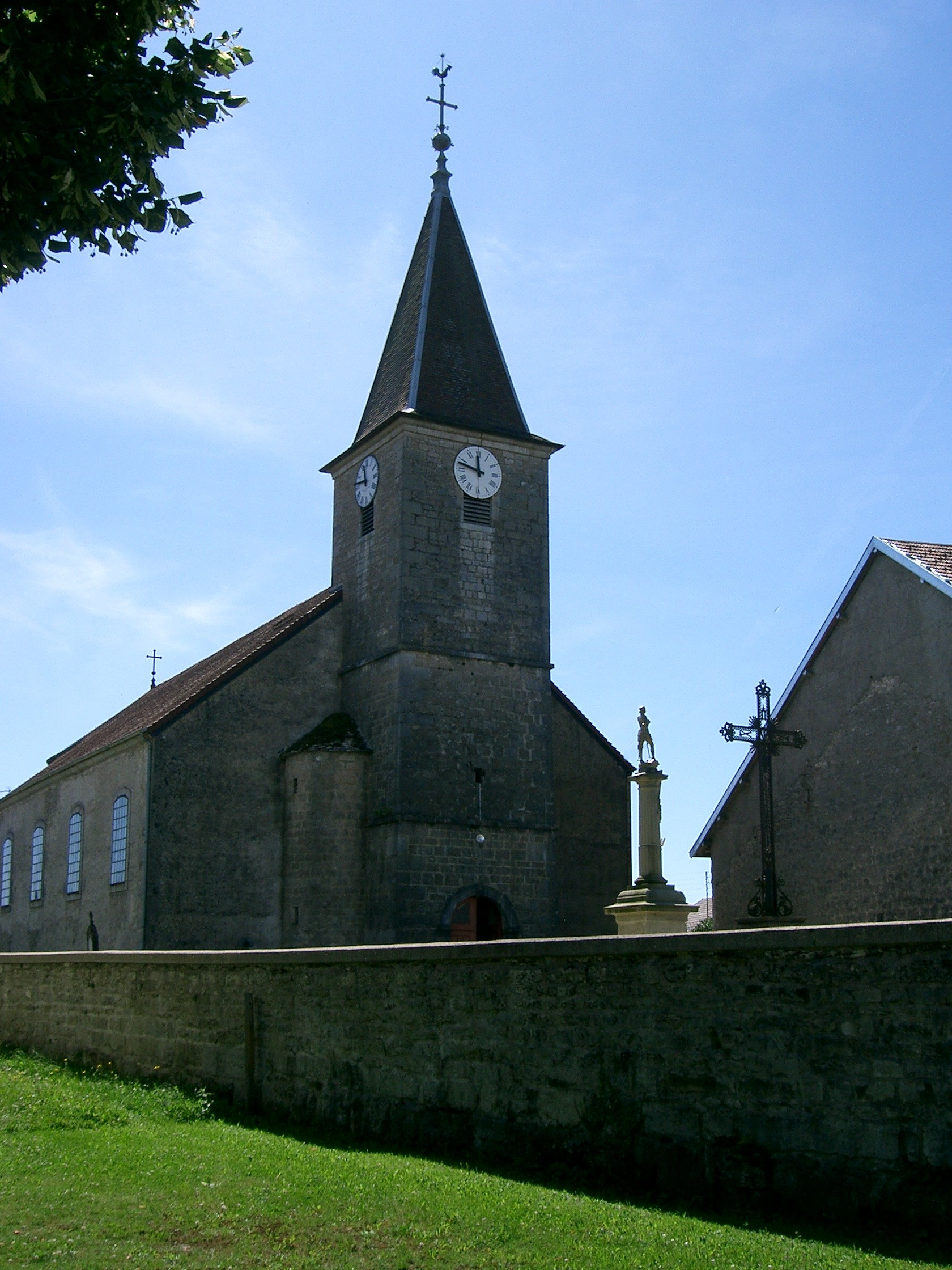 église de Mont-sur-Monnet (Jura - France)